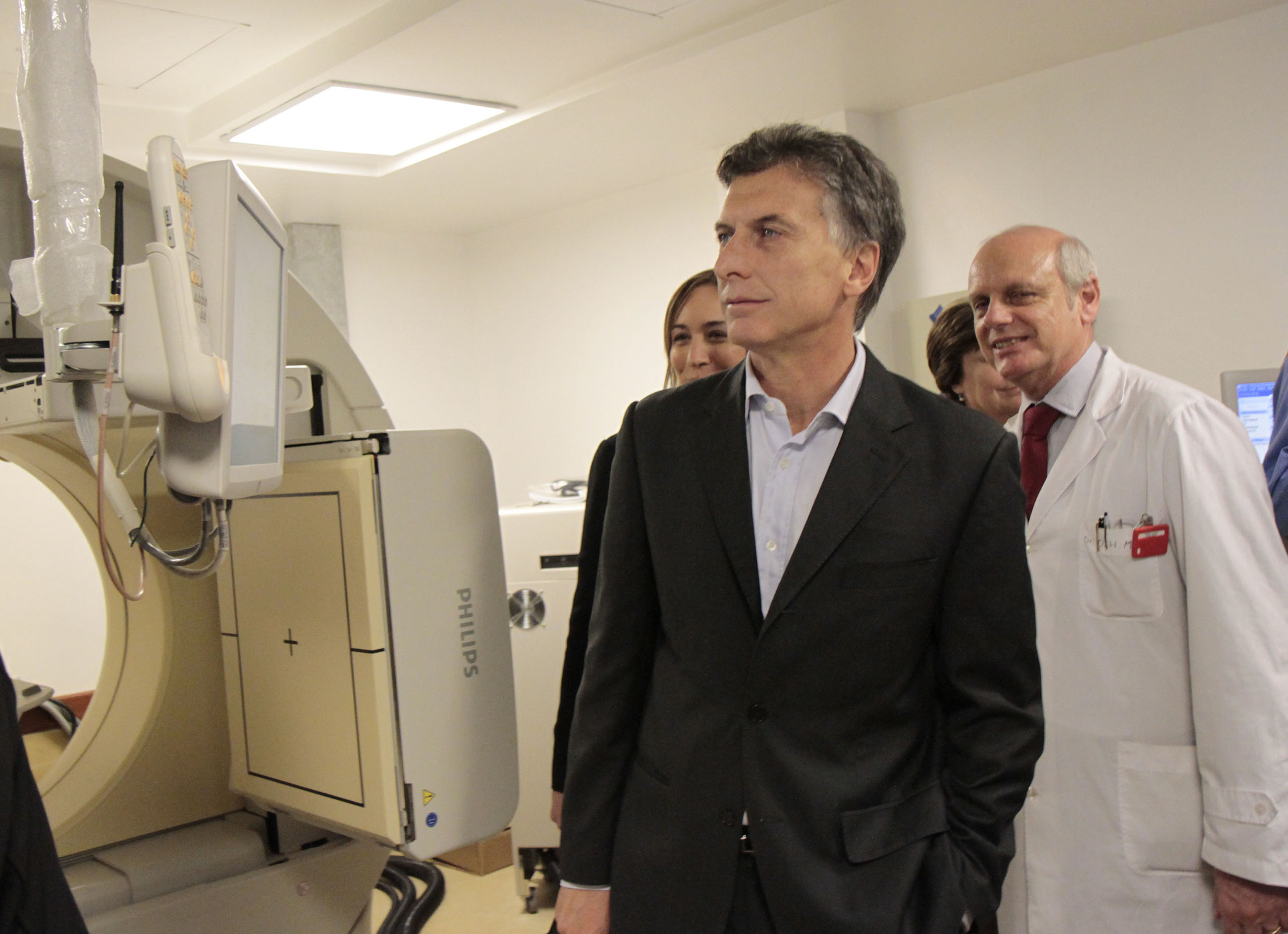 Buenos Aires. Agosto 22 de 2013. El jefe de Gobierno de la Ciudad de Buenos Aires, Mauricio Macri, inauguró hoy una Cámara Gamma y un Tomógrafo en el Hospital Argerich. Foto Mariana Sapriza-gv/GCBA.